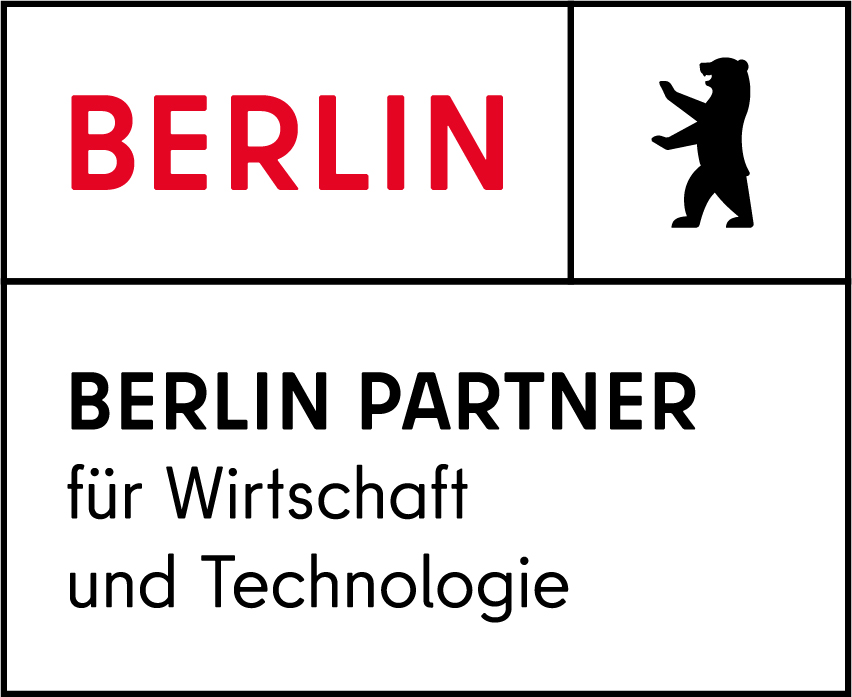 Logo: Berlin Partner für Wirtschaft und Technologie GmbH